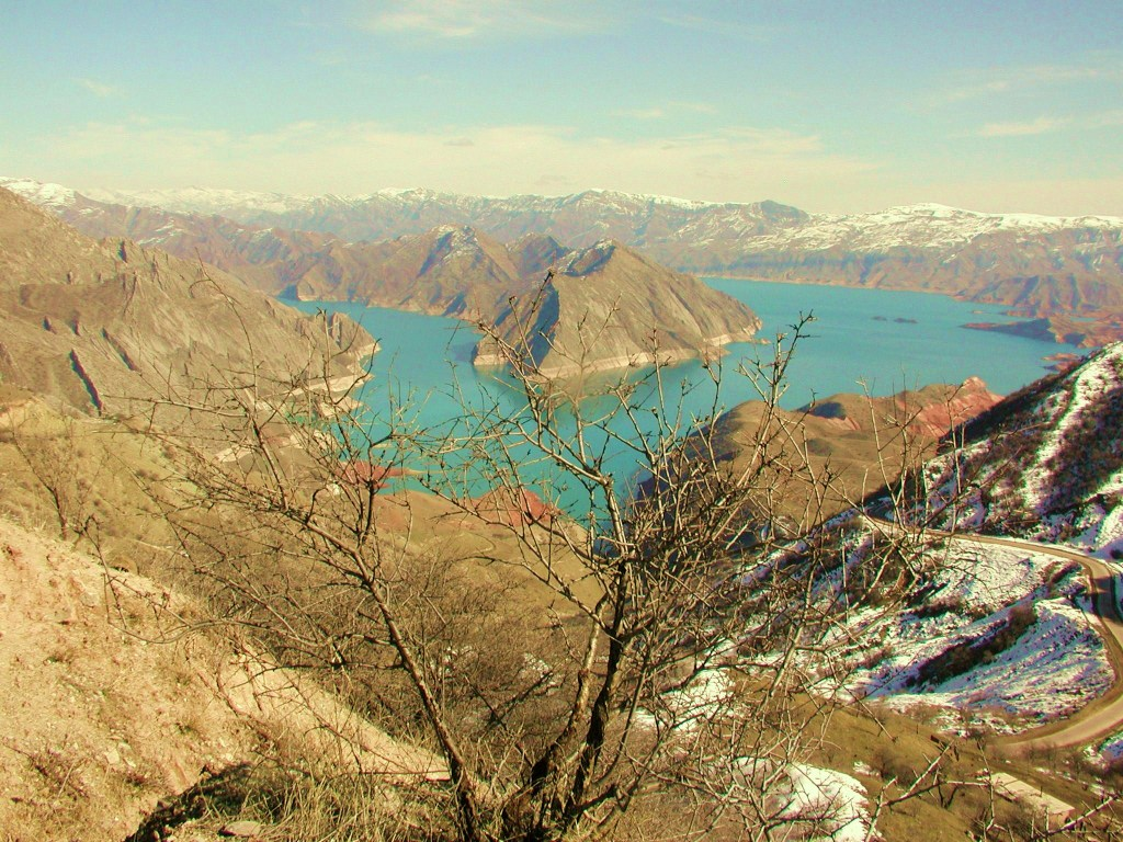 Нурекское водохранилище